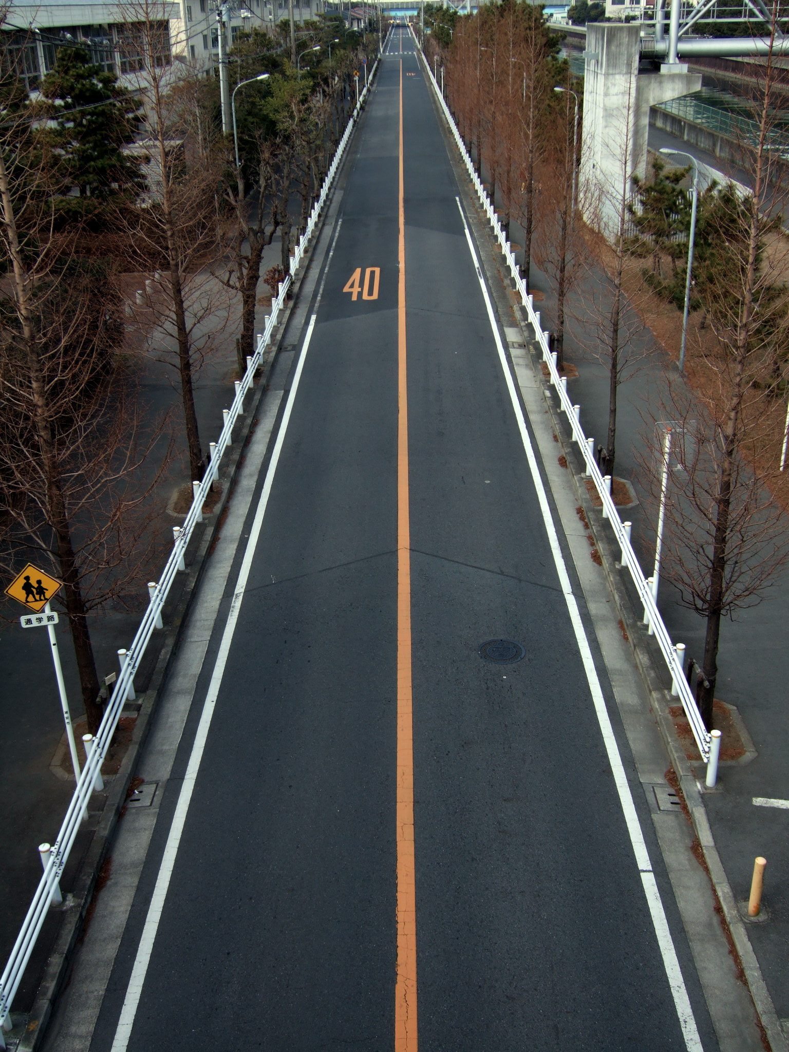 damn straight!